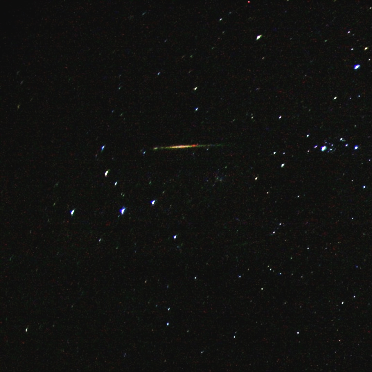 Разнобоен орионид